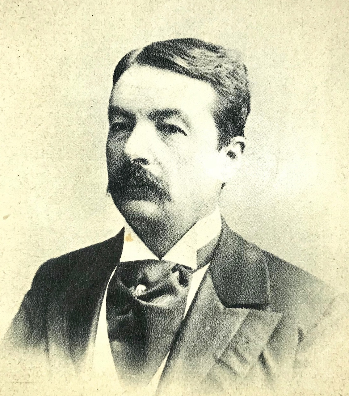 Édouard Odier: Nationalrat, Ständerat und Schweizer Gesandter in St. Petersburg